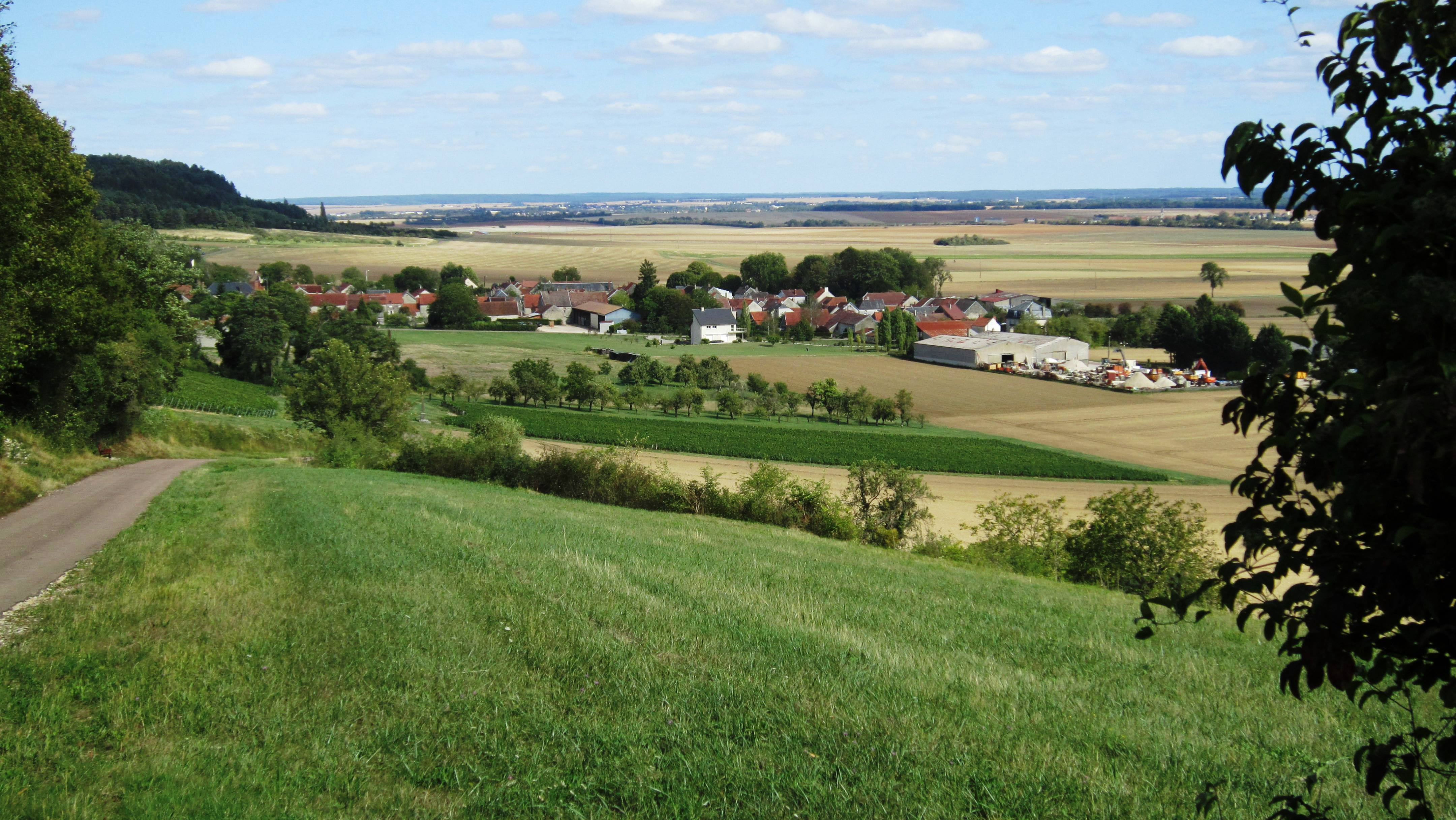 Poinçon-lès-Larrey (Côte-d'Or)